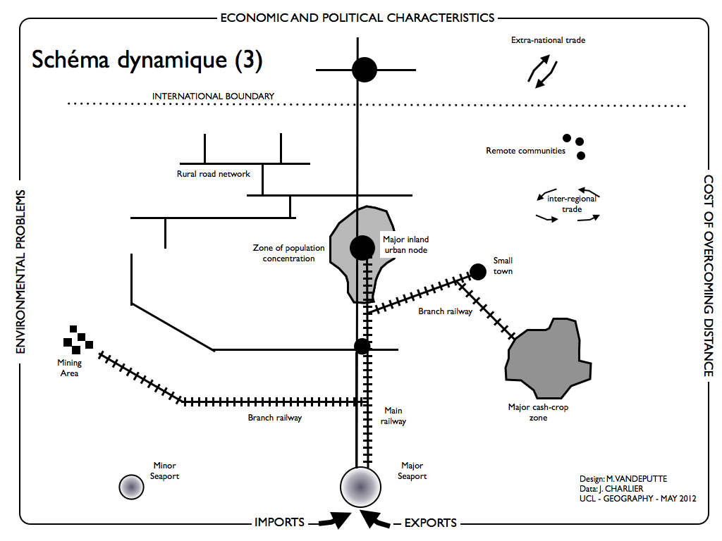 Schéma de développement d'un réseau de transport en Afrique Centrale